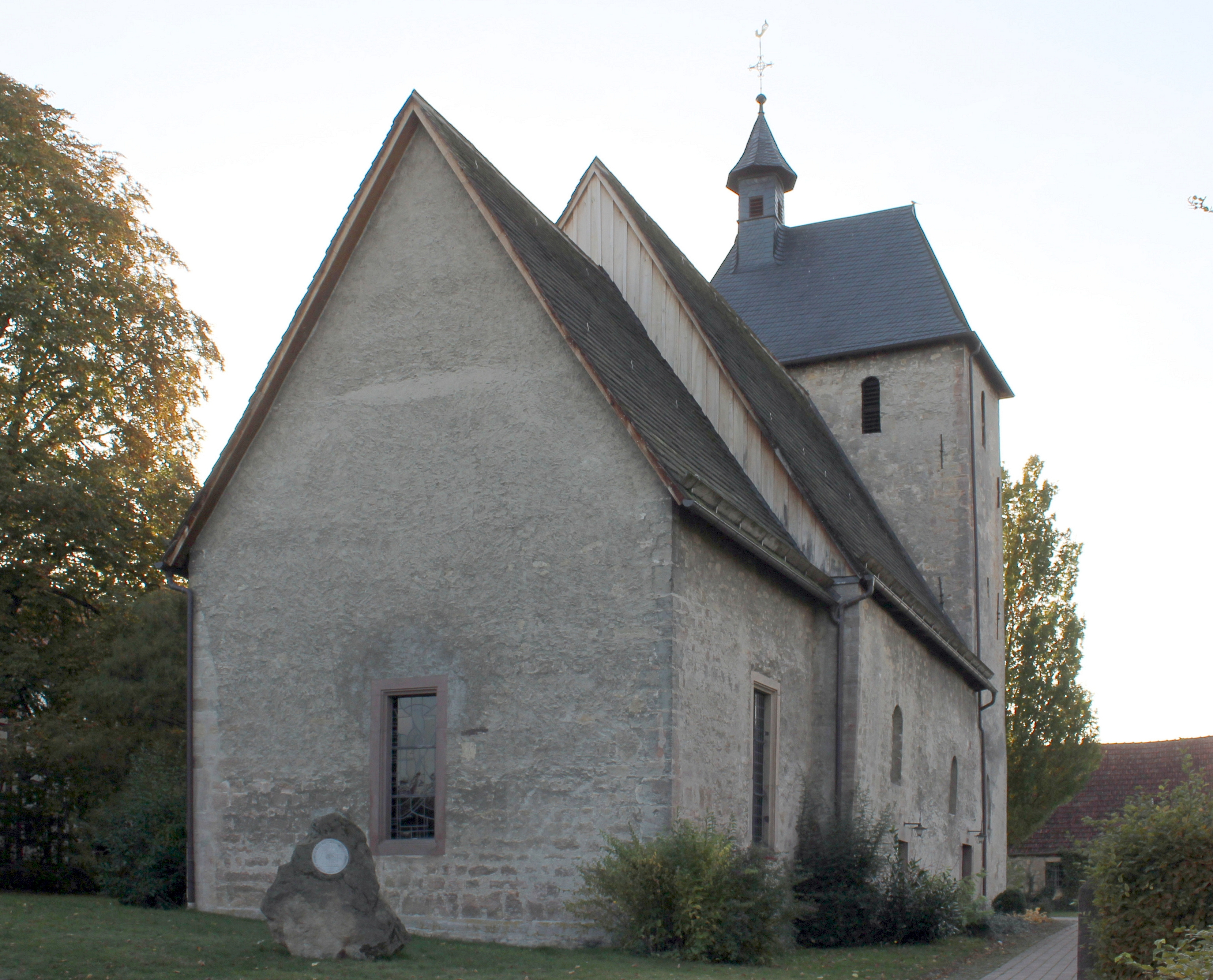 ev.Kirche in Wettesingen, Gemeinde Breuna, Ansicht von Nordosten